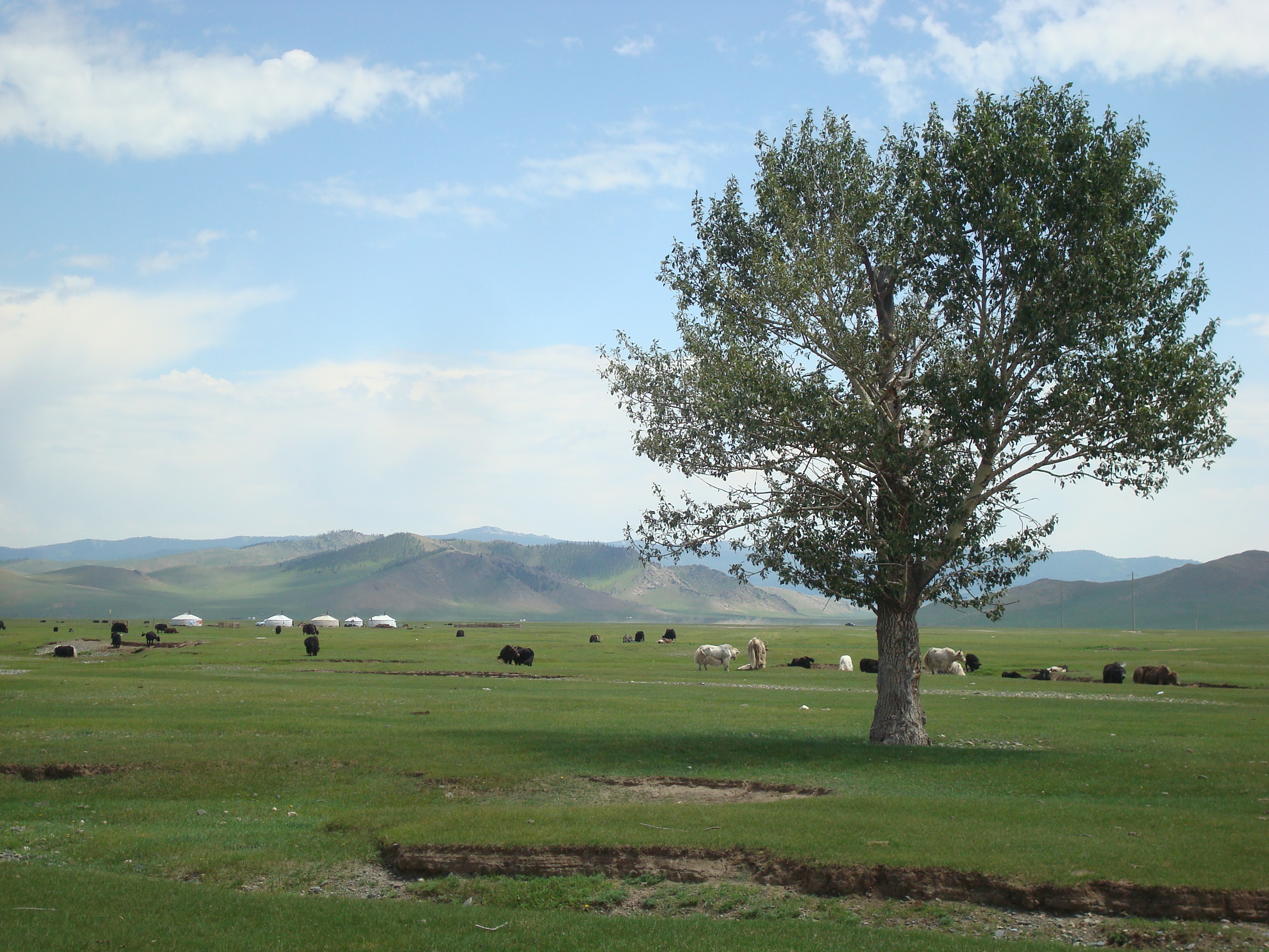 Nahe Tsetserleg